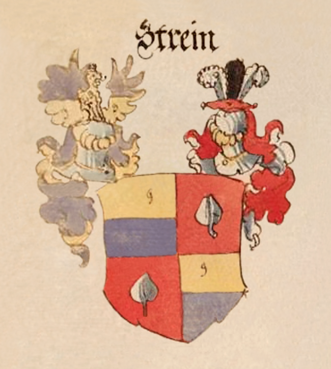 Wappen der Strein (Streun) - Wappensammlung - BSB Cod.icon. 307; Seite 192